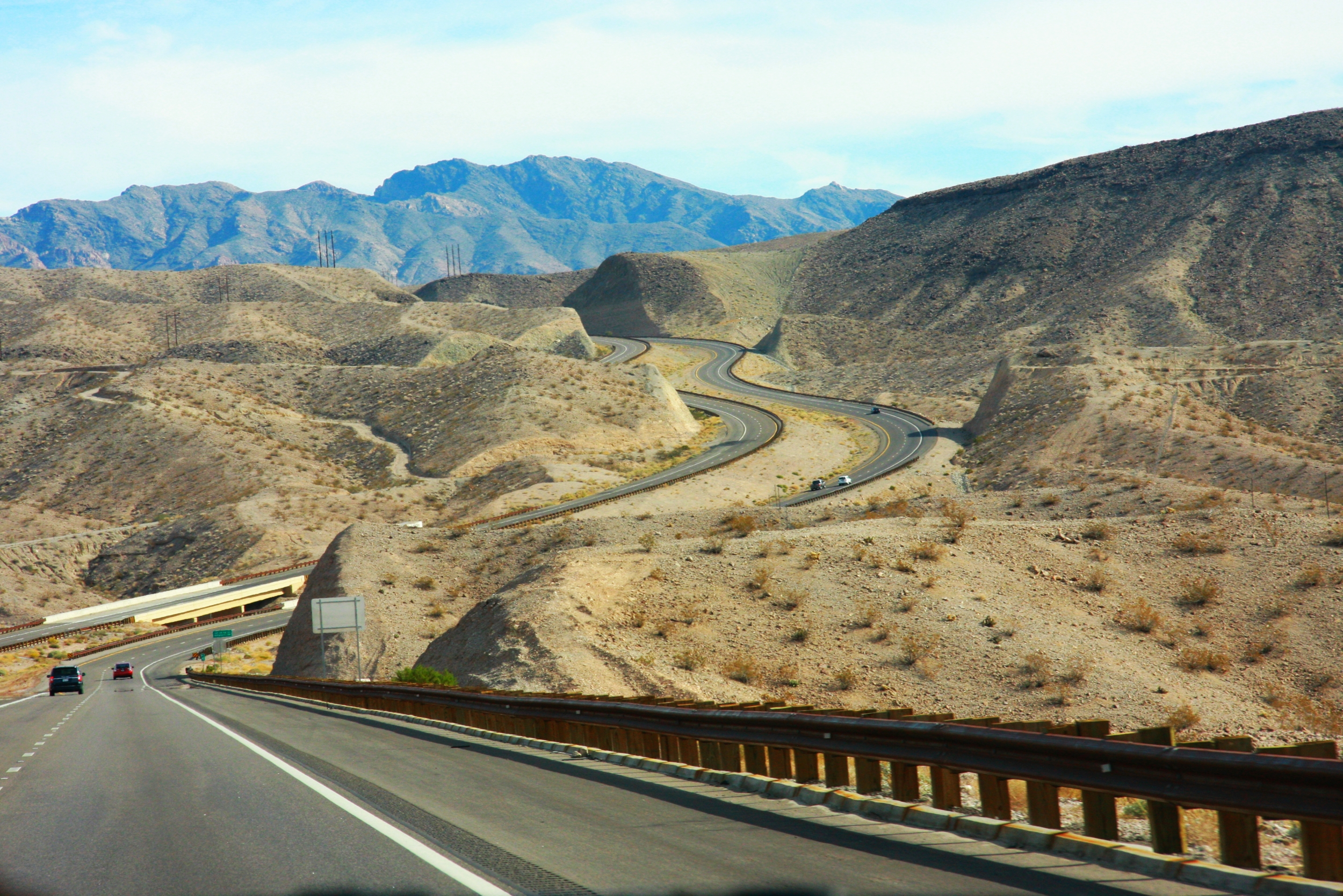 Droga krajowa US 93 pomiędzy Kingman w Arizonie a Las Vegas